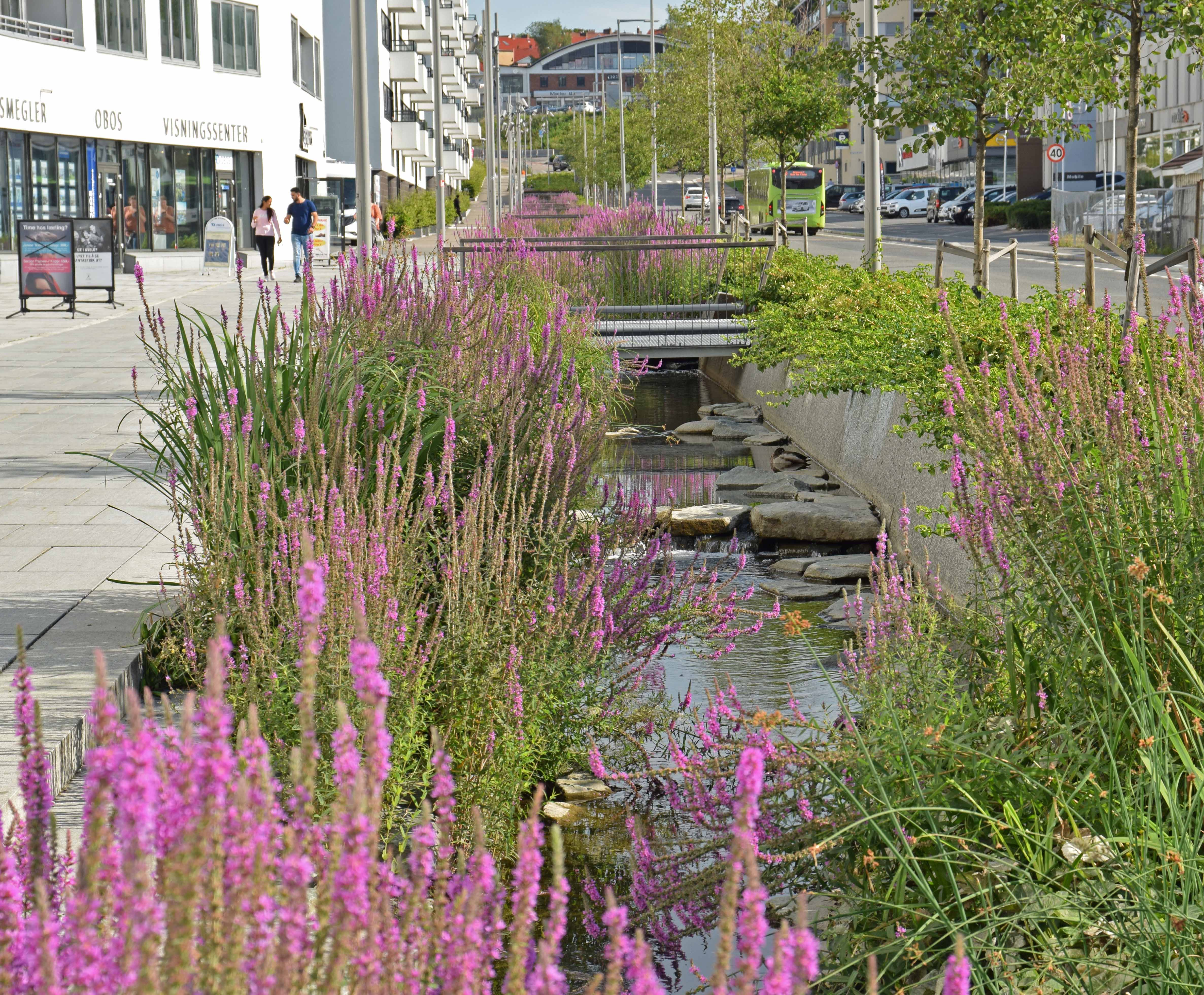 Gladengveien, Ensjø, med Hovinbekken åpent mellom fortau og bilfelter (2017), ved OBOS visningssenter i nr. 4.